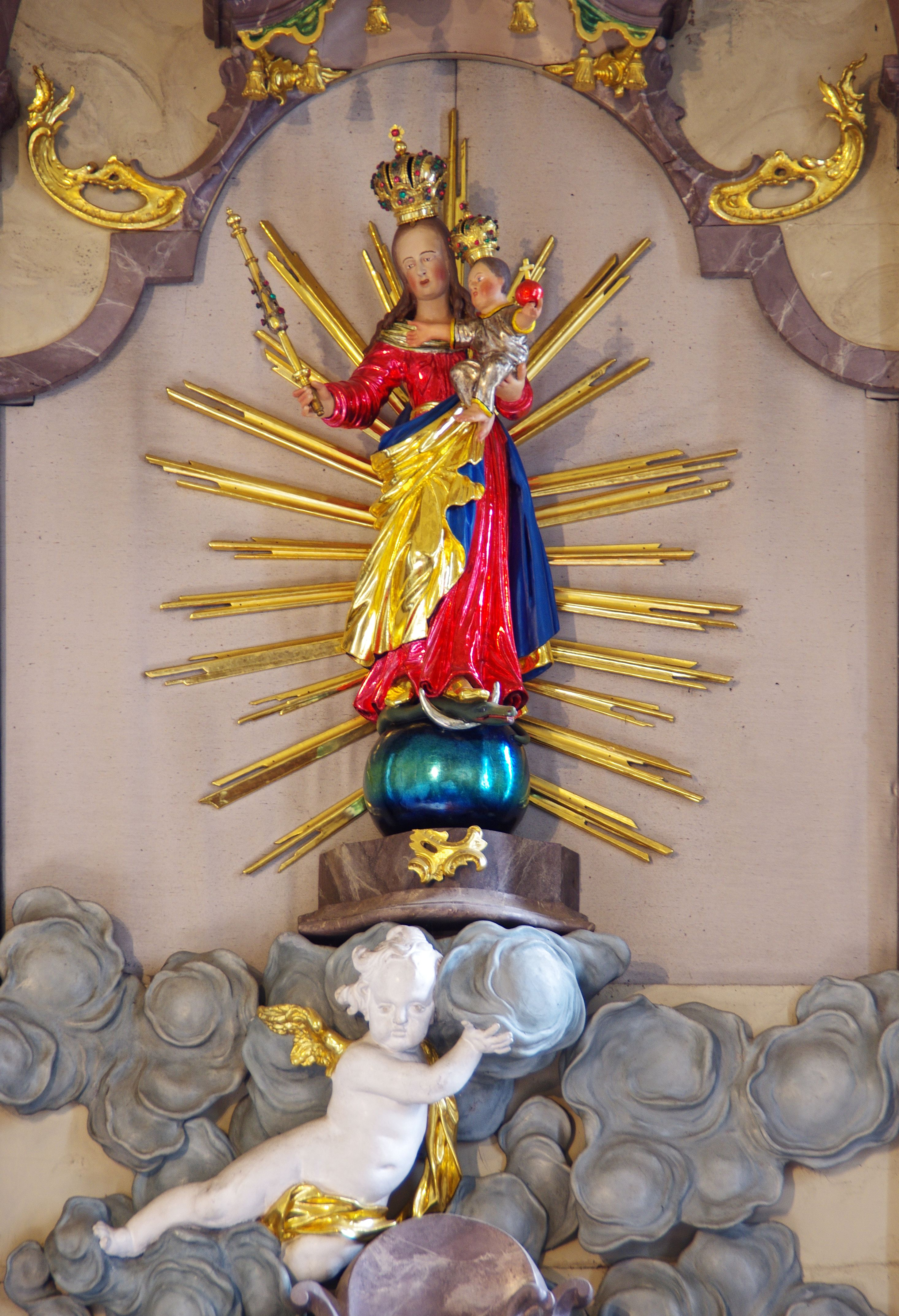 Die katholische Kirche St. Jakobus in Stegen-Eschbach